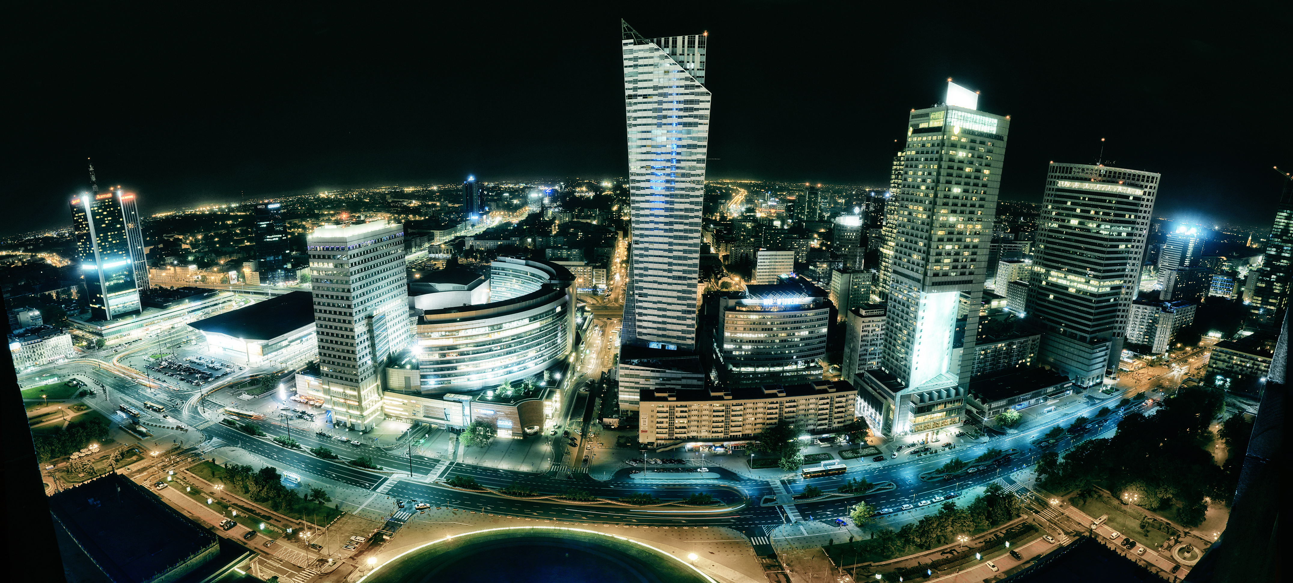 Nocna panorama ul. Emilii Plater z tarasu widokowego PKiN